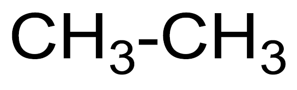 Ethane IUPAC